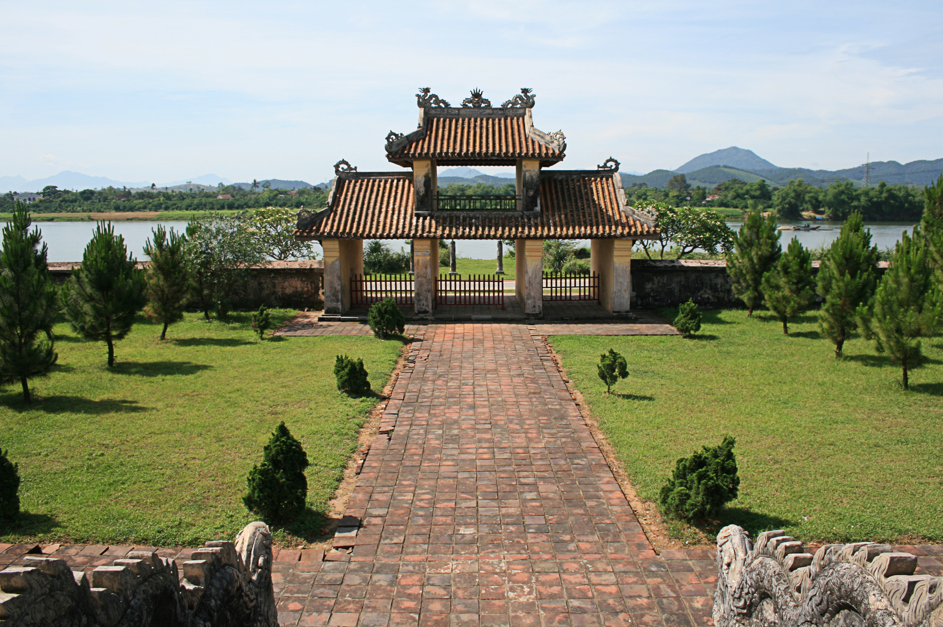 Temple Main gate(Văn Miếu Môn). Temple of Letters, Hue (Văn Thánh Huế))